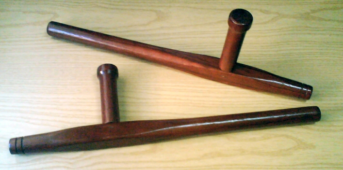 Foto de una Tonfa de Madera